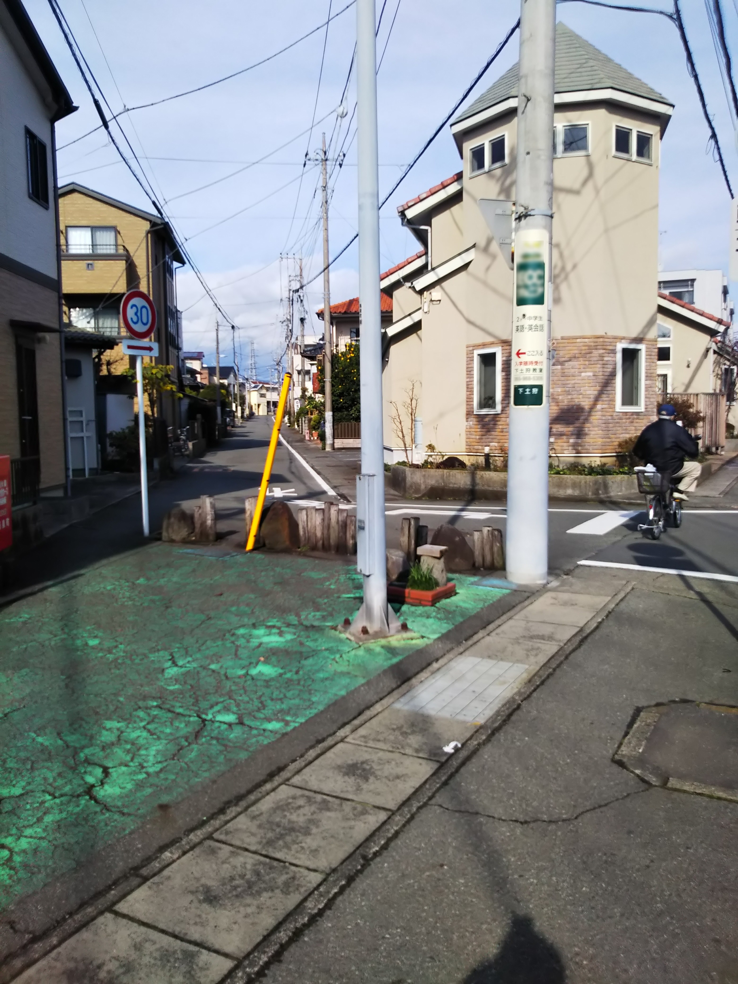 静岡県長泉町の、世界一小さな公園の周辺の様子。厳密には道路施設の一部であり公園ではなく、ギネス世界記録に登録されてはいないとのこと。